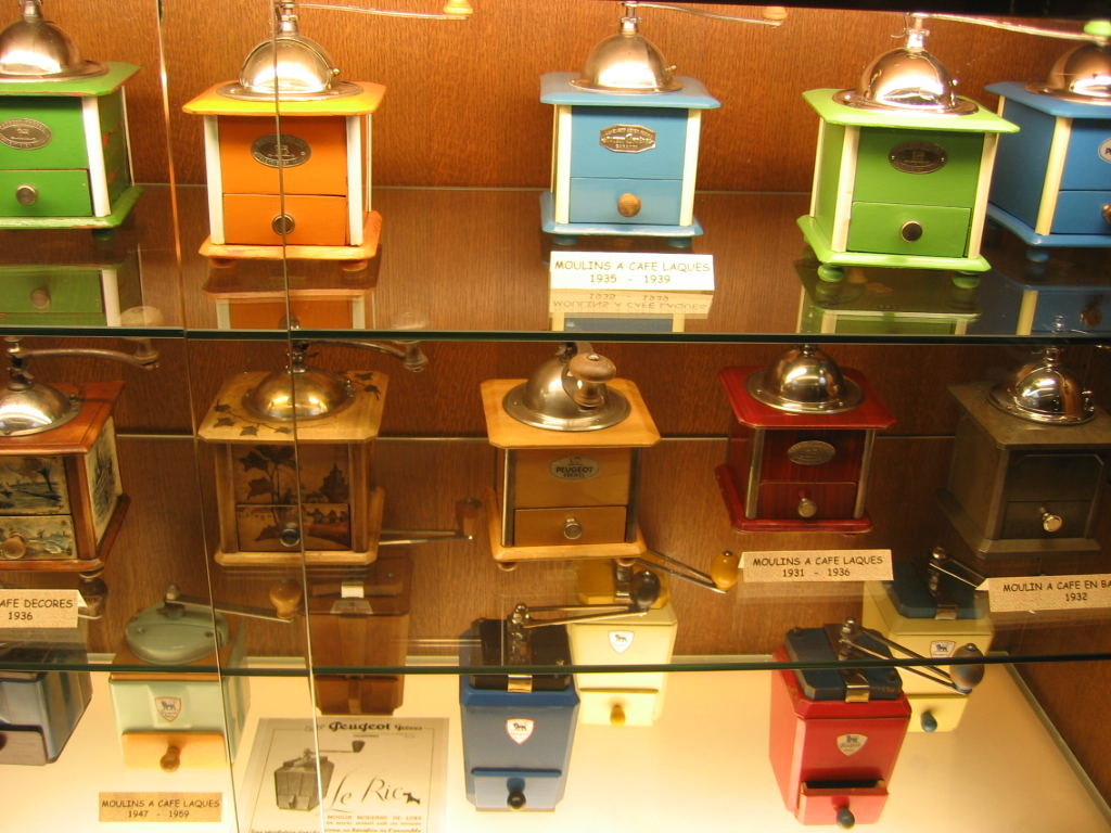 Moulin à Café Peugeot - Musée Peugeot Sochaux